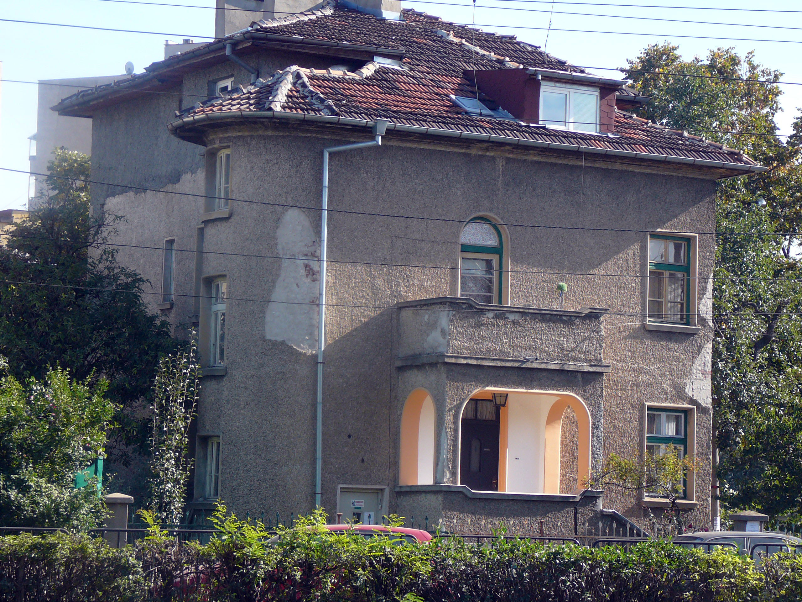 Bakston (Sofia)